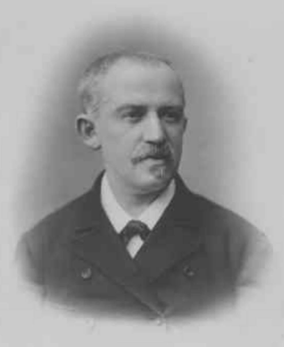 Salomon Stricker (1834-1898), österreichischer Pathologe und Histologe